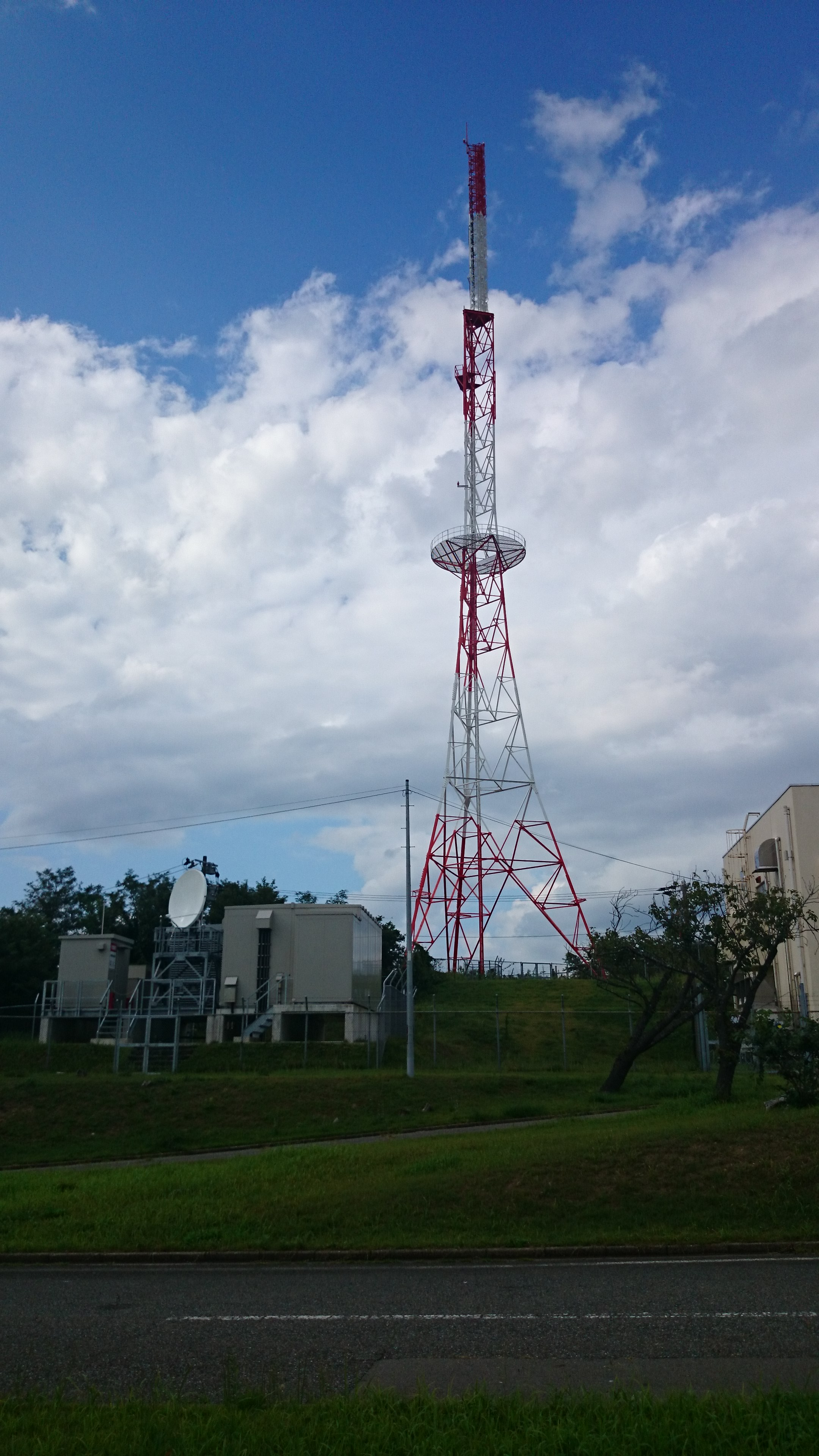 秋田放送大森山テレビ送信所2